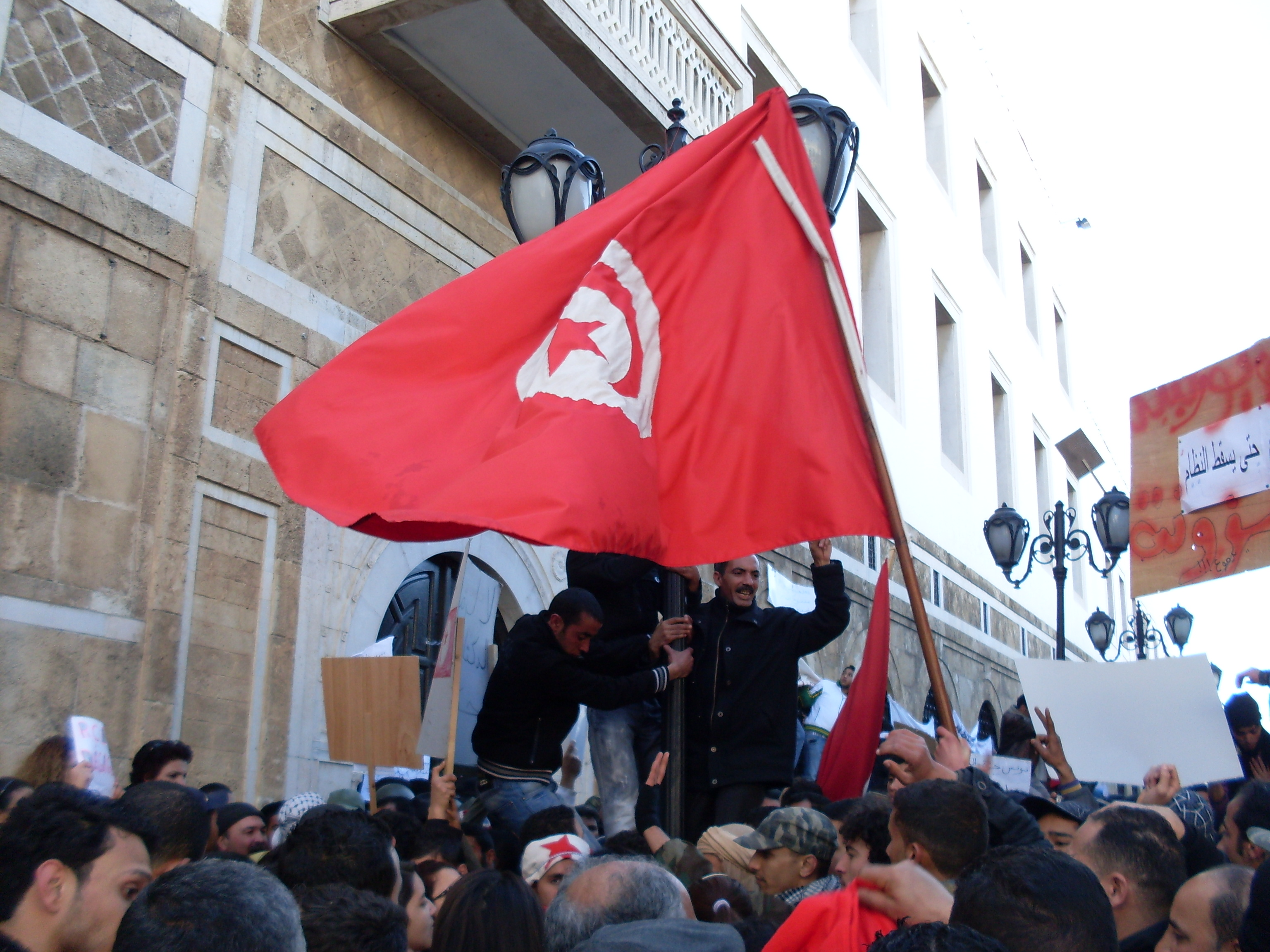 Manifestation à la place du Gouvernement lors de la Caravane de la libération suite à la révolution tunisienne